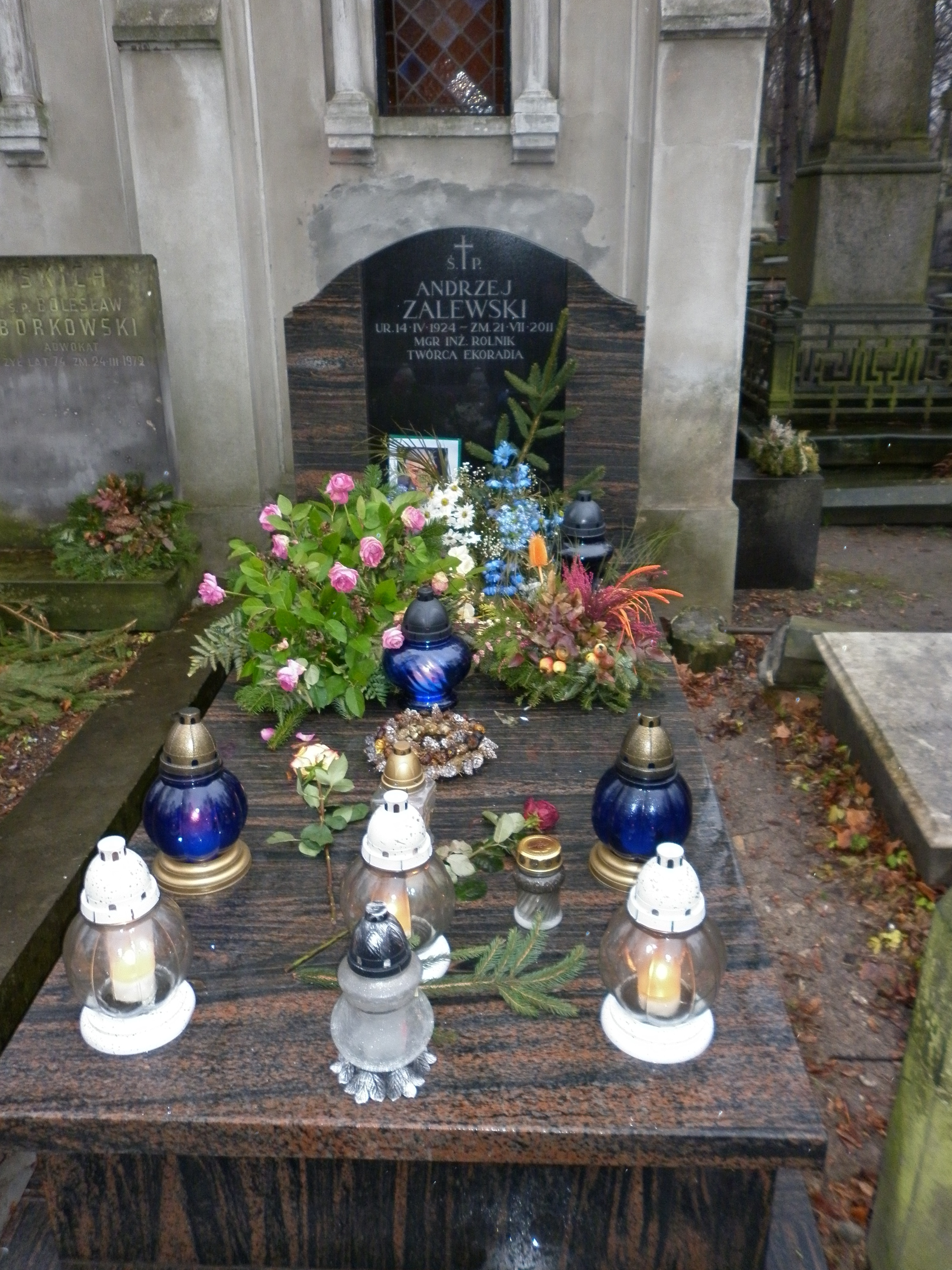 Grób Andrzeja Zalewskiego na Starych Powązkach